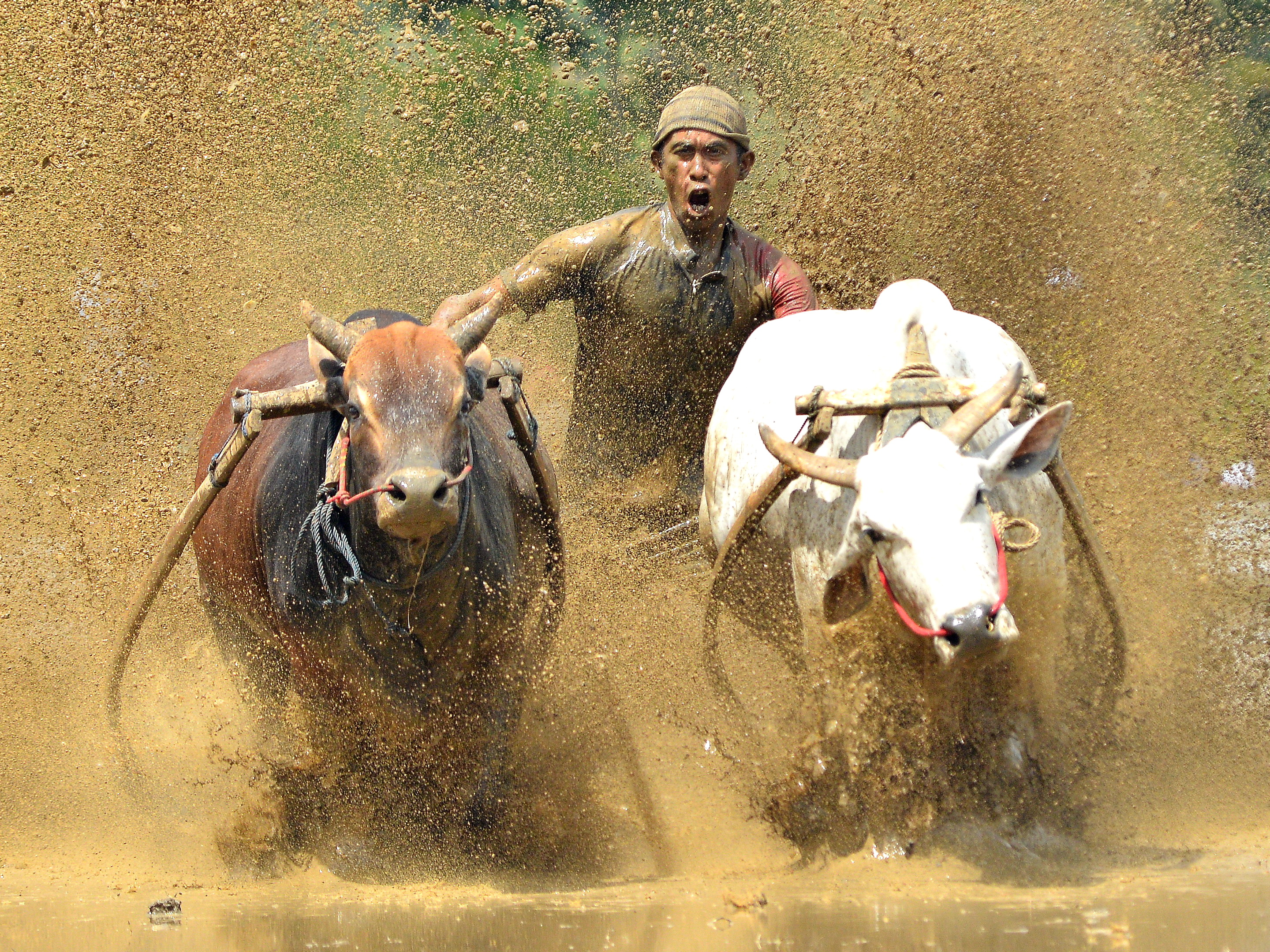 Pacu jawi adalah tradisi sehabis panen di Kabupaten Tanah datar, tradisi ini lestari sampai kini dan dikemas menjadi tontonan menarik untuk wisatawan lokal dan mancanegara.